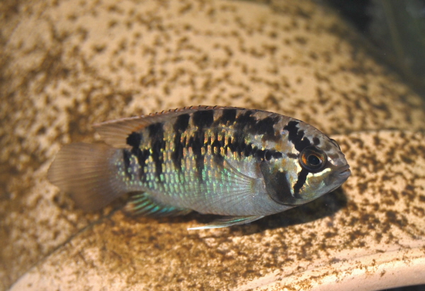 Hunnfisk av Ivanacara adoketa - female Nannacara adoketa